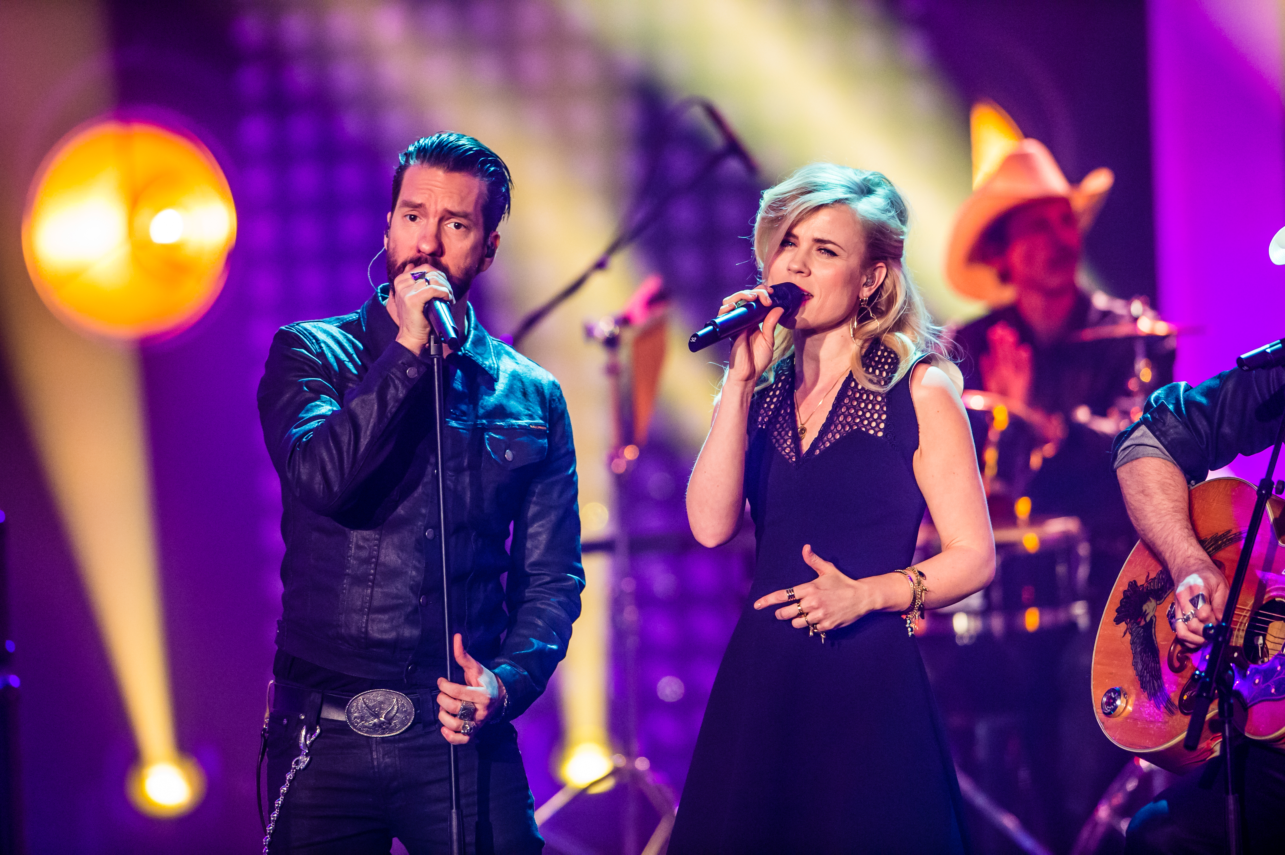 Eurovision Song Contest 2016 - Unser Lied für Stockholm Intermediate Act - The BossHoss & The Common Linnets